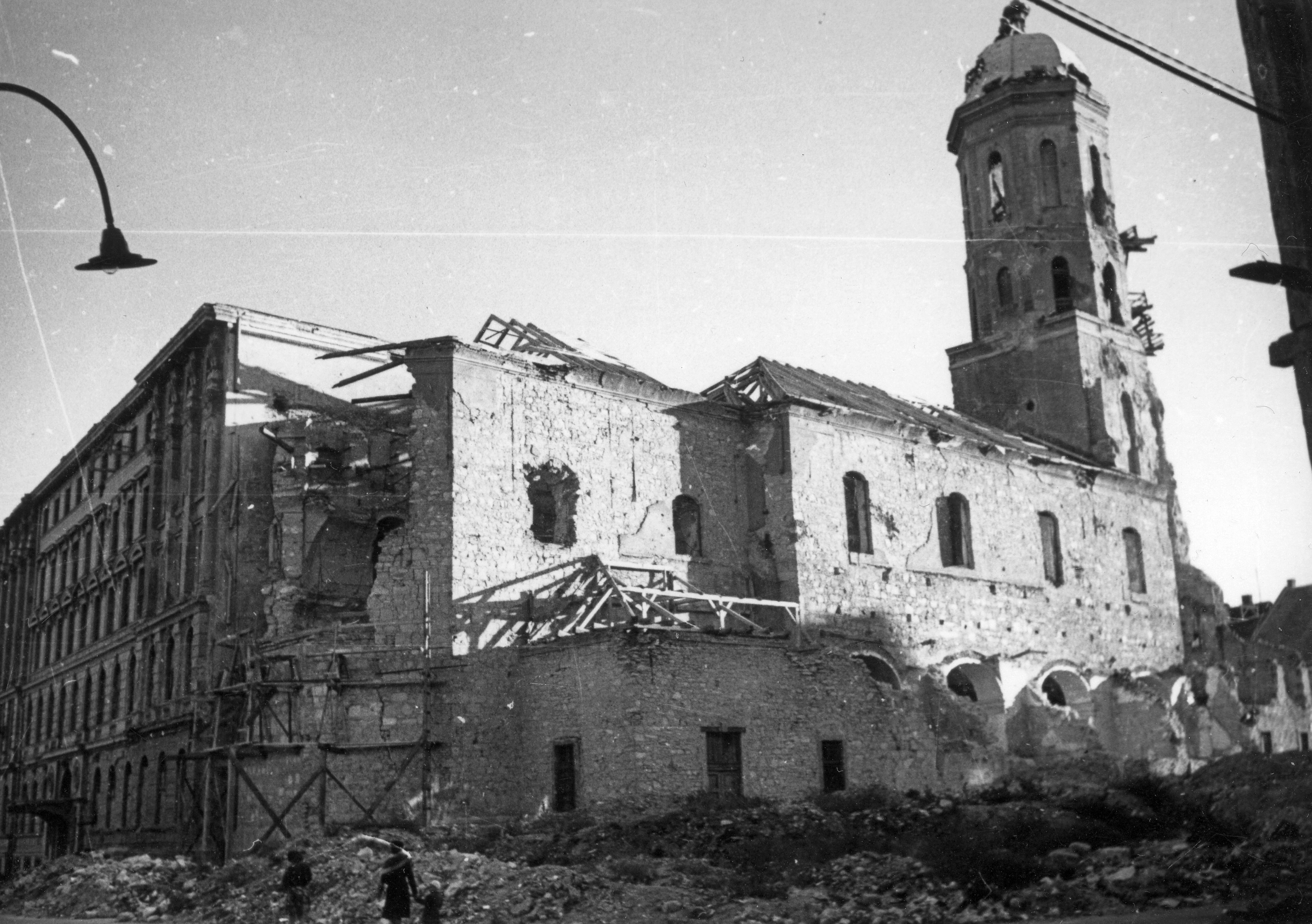 Kapisztrán tér, Mária Magdolna-templom. Balra az Országház utca. Location: Hungary, Budapest I. Tags: church, war damage, ruins, Budapest Title: Kapisztrán tér, Mária Magdolna-templom. Balra az Országház utca.